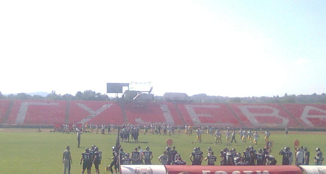 Srpski (latinica): Utakmica Kragujevac Wild Boars - Vukovi Beograd igrana u Kragujevcu